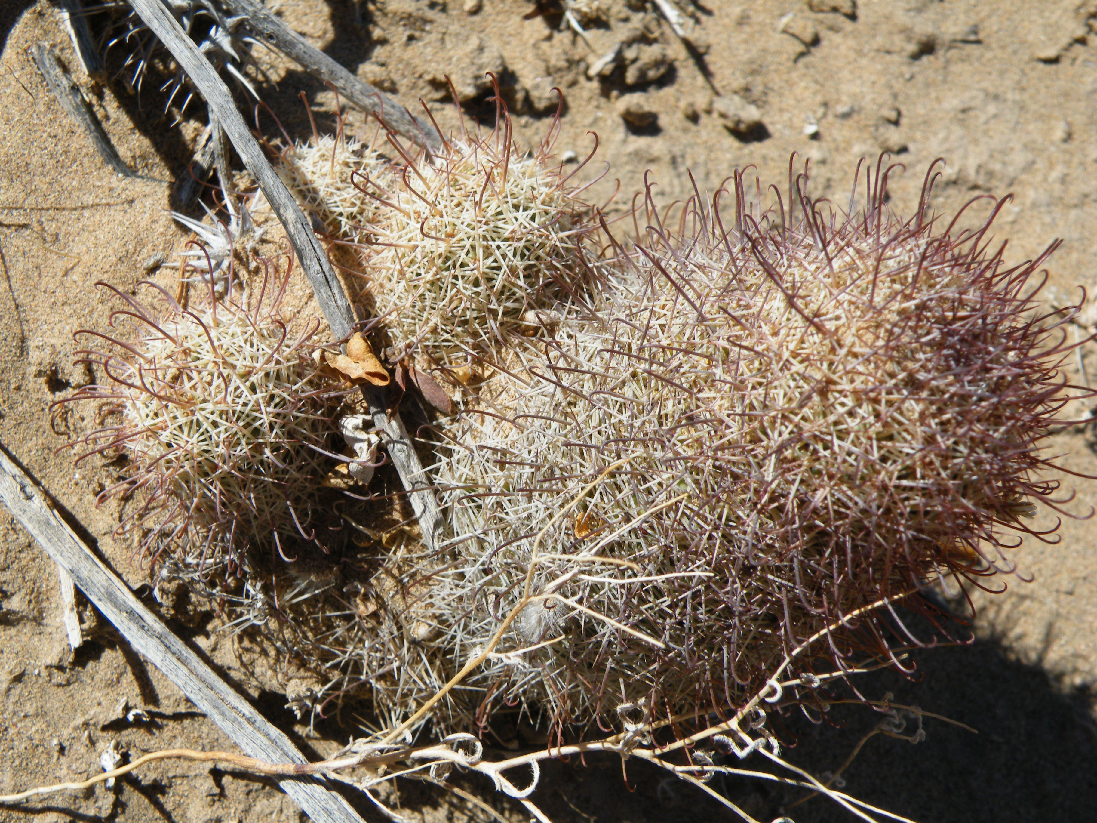 Viscaino, Baja California Sur